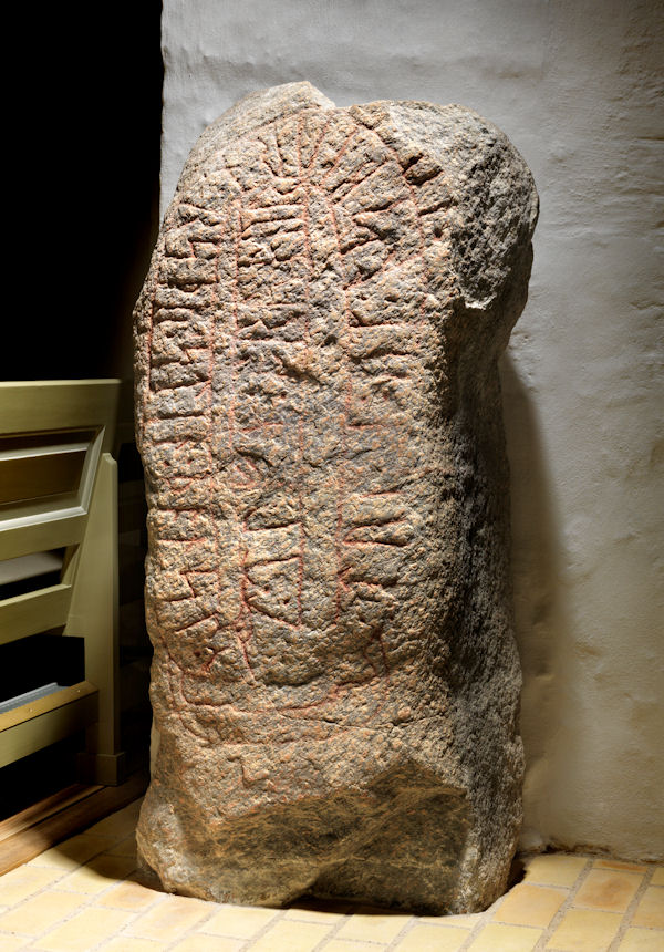 Foto af Roberto Fortuna